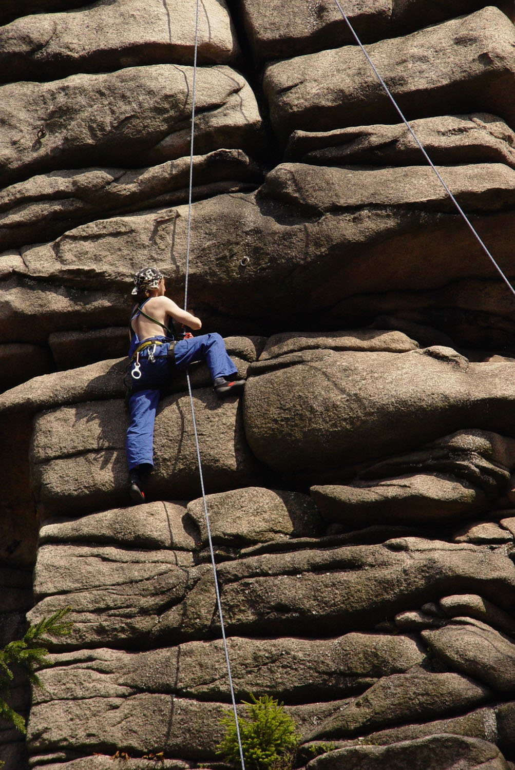 Klettergarten